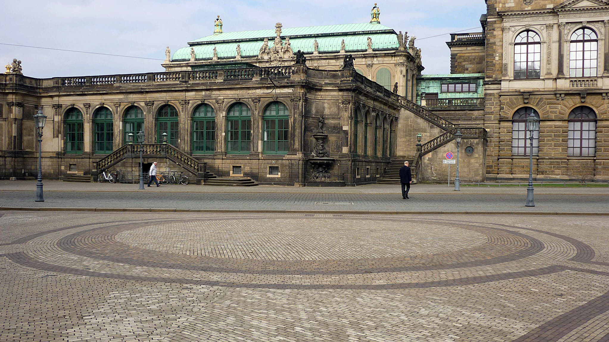 Mosaikpflaster am Taschenberg in Dresden (1896-1945 Standort des Wettin-Obelisk)